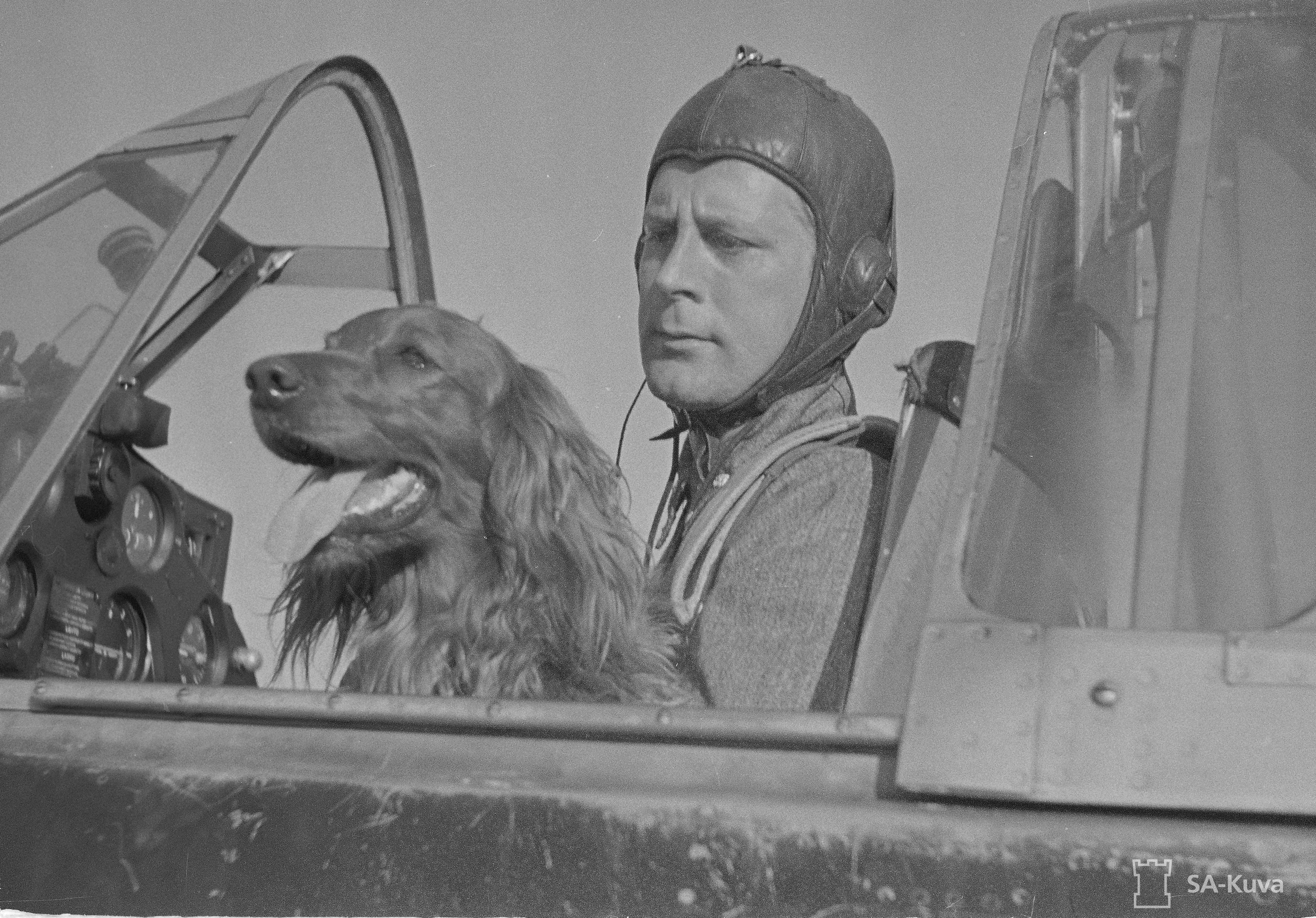 Jorma Karhunen ja maskottikoira 1. kesäkuuta 1942